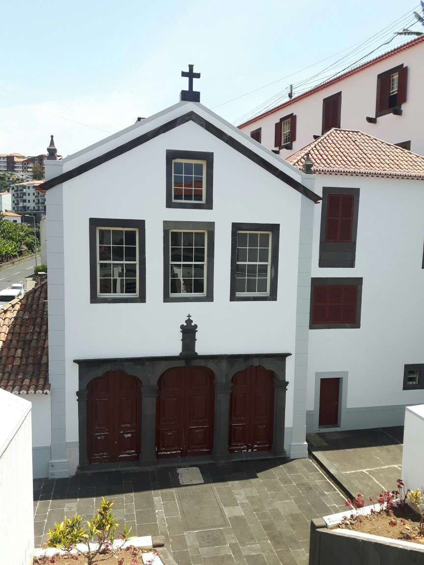 Mosteiro São Bernardino - Câmara de Lobos